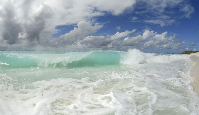 Cayos Bequeve, Archipielago Los Roques, Mar Caribe, Antillas Menores, Dependencias Federales de Venezuela